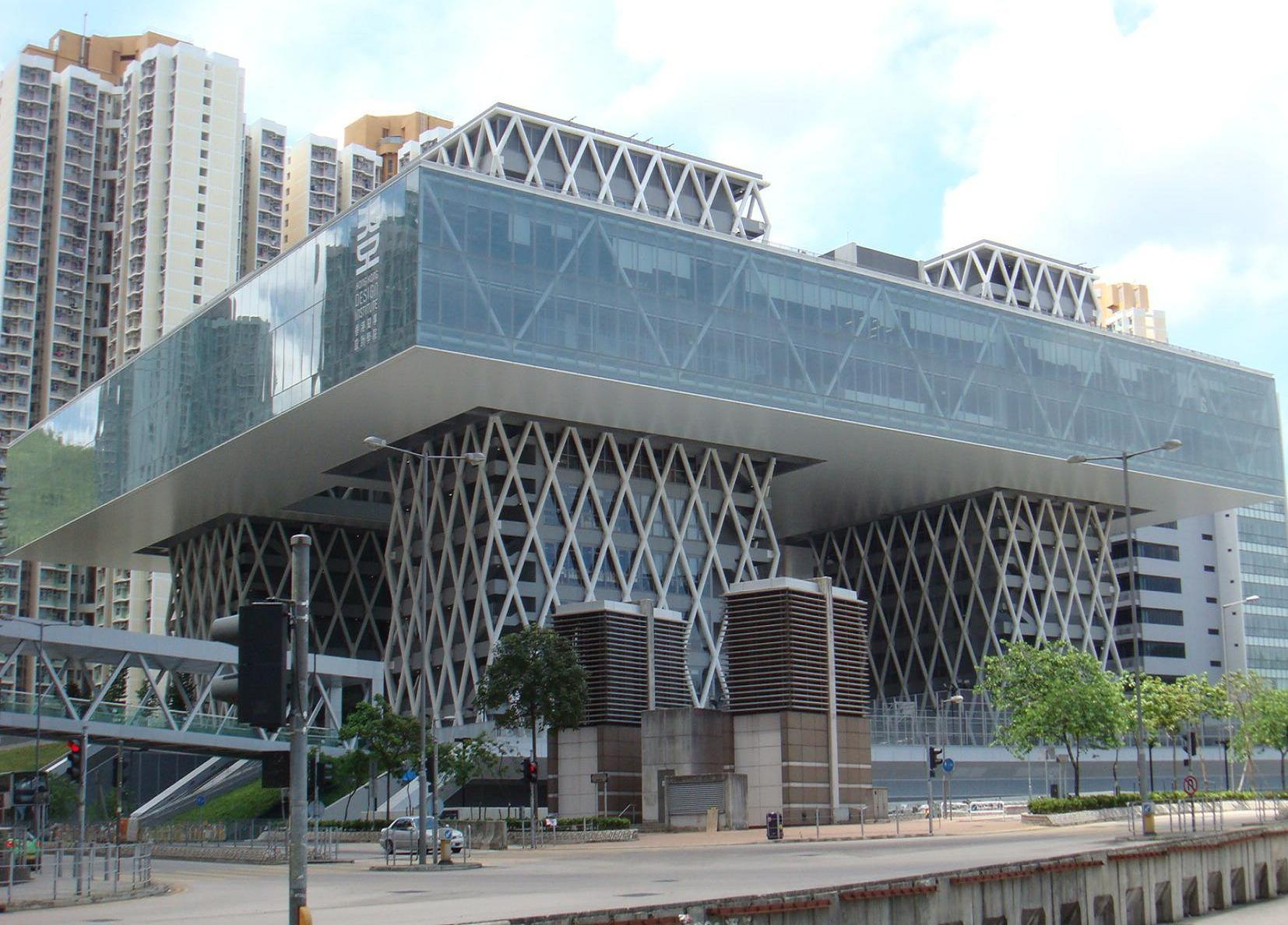 香港設計學院